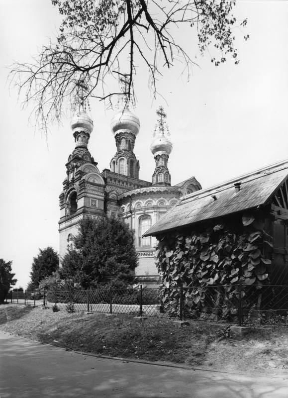 Darmstadt, Mathildenkirche Die Russische Kapelle wurde auf Kosten des Zaren Nikolaus II. 1898 von Prof. Benois, St. Petersburg, erbaut. Die Werkstücke kamen fertig aus Rußland. Die Kirche diente dem letzten Zarenpaar zum Gottesdienst bei den häufigen Darmstädter Besuchen.